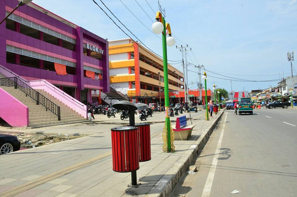 Pasar Raya Padang Kembali Jadi Etalase Sumbar